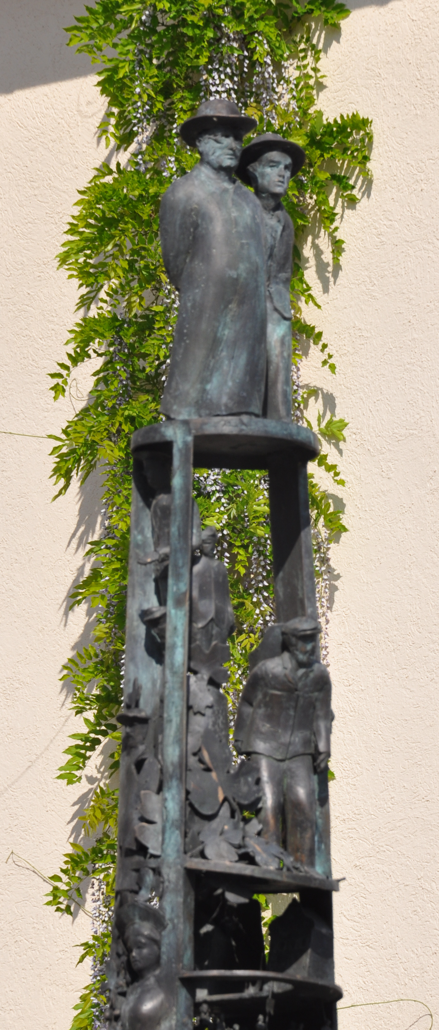 Hagnau am Bodensee, „Schneeballensäule“ von Gerold Jäggle, 2002; Detail: ganz oben Heinrich Hansjakob und sein Sakristan, darunter Rebmann